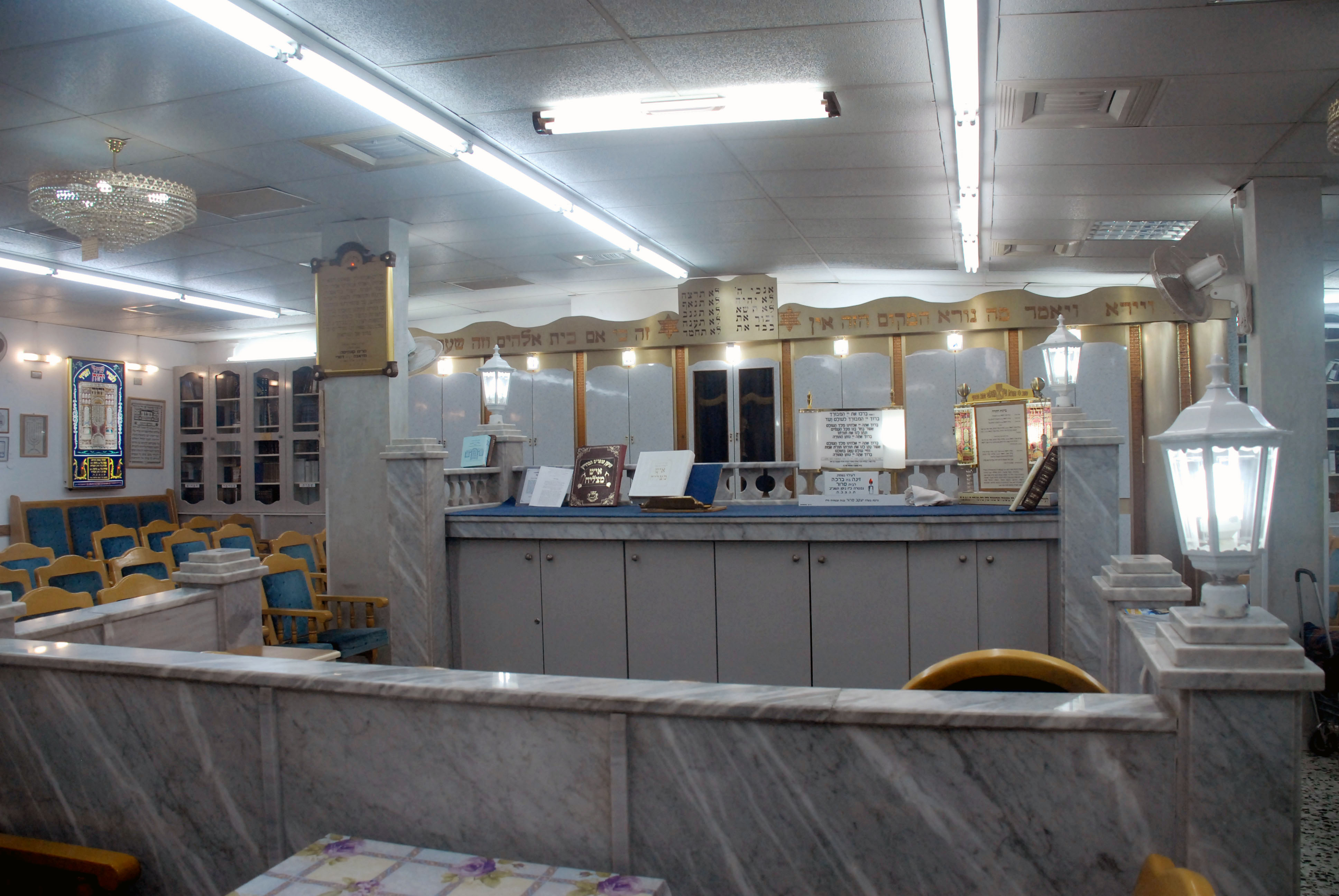 ארון הקודש (צילום מתיבת החזן) בית הכנסת "בית יוסף" ע"ש הרב יוסף סוסו הכהן